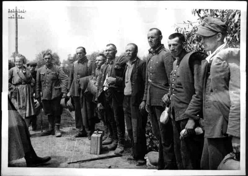 Von der Roten Armee 1939 gefangengenommene polnische Soldaten, die während des deutschen Vormarsches 1941 in der Ukraine von der Wehrmacht aufgegriffen wurden. (6.7.1941.)